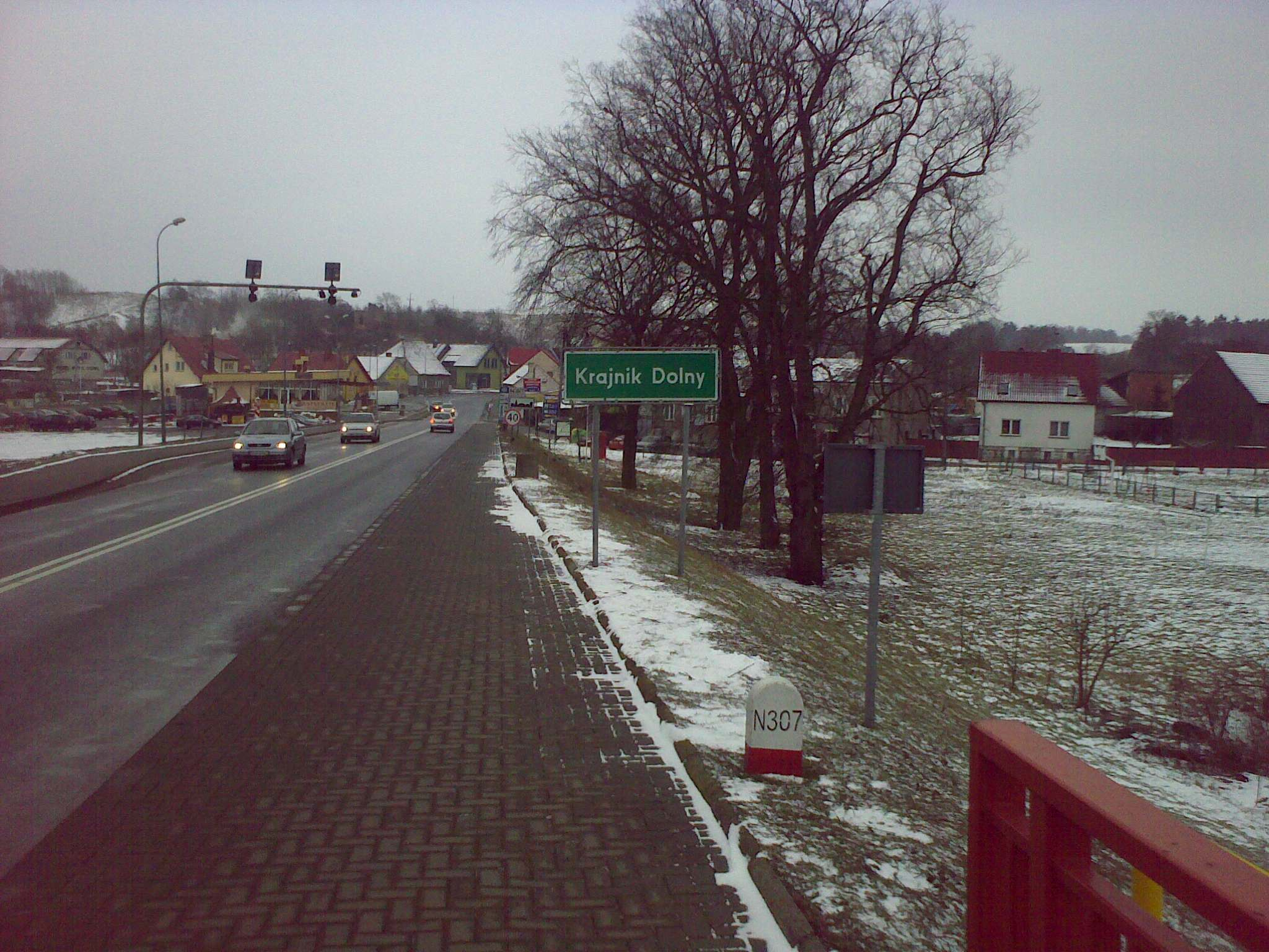 Ortseingang Krajnik Dolny